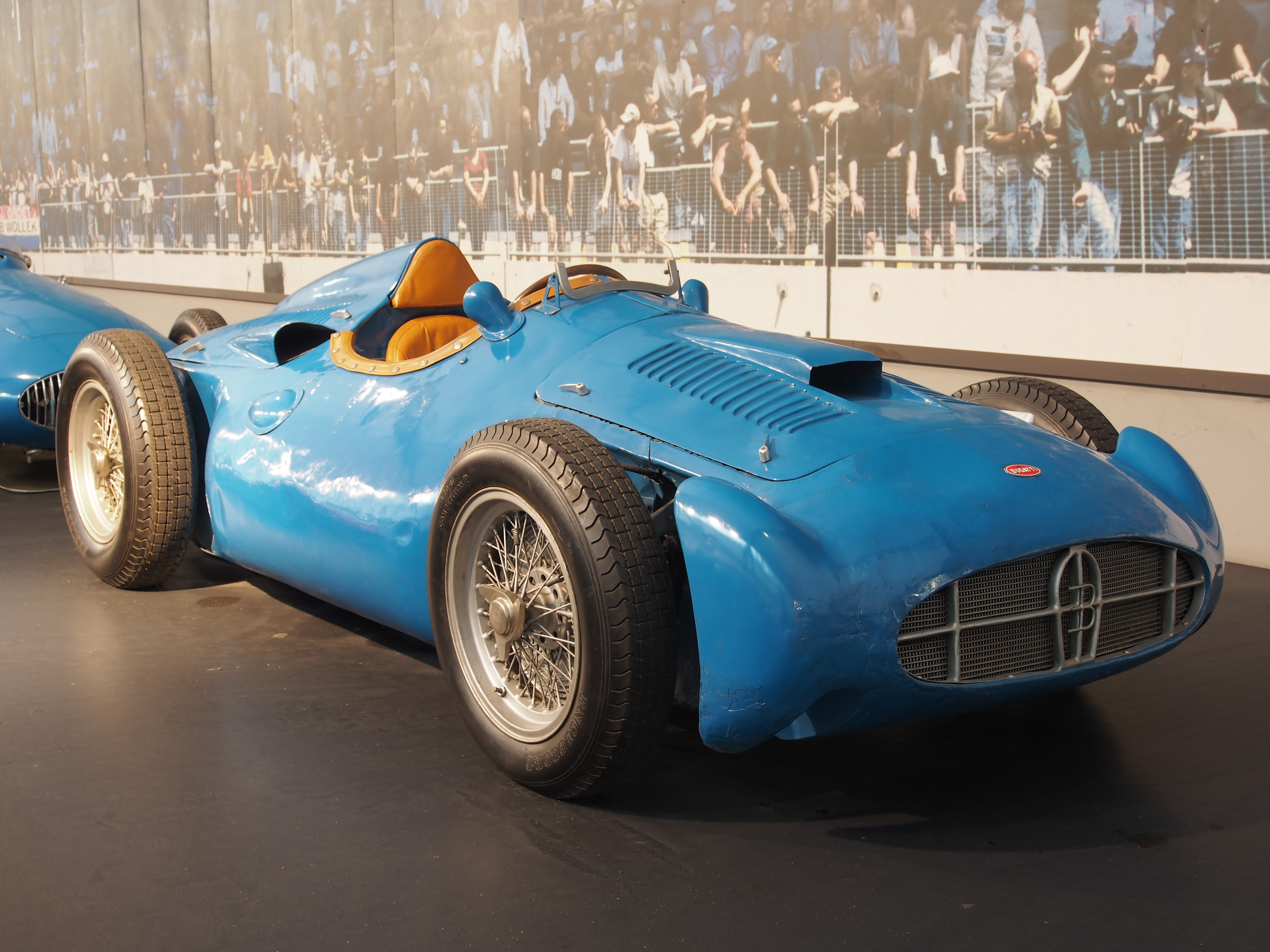 Photographed at the Cité de l’Automobile, Musée national de l’automobile, Collection Schlumpf, Mulhouse, France.